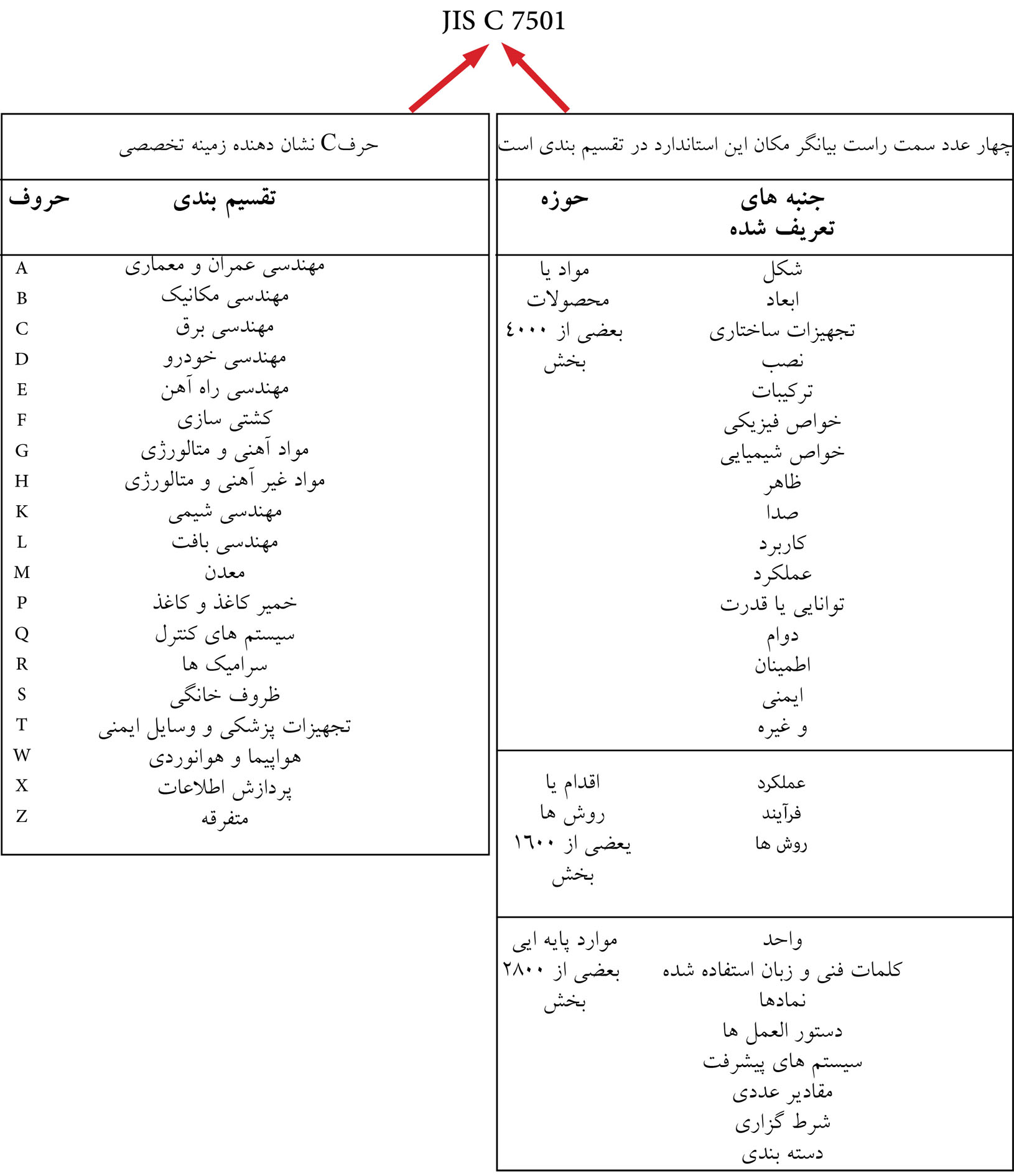 JISC Standards